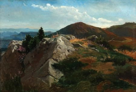 “Горный пейзаж” Германия, XIX в. Холст, масло. Размер: 40 х 59 см.